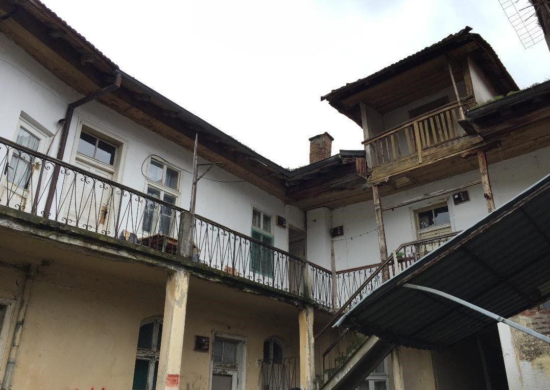 Вила Цакић, фотографија из дворишта настала 2016. године